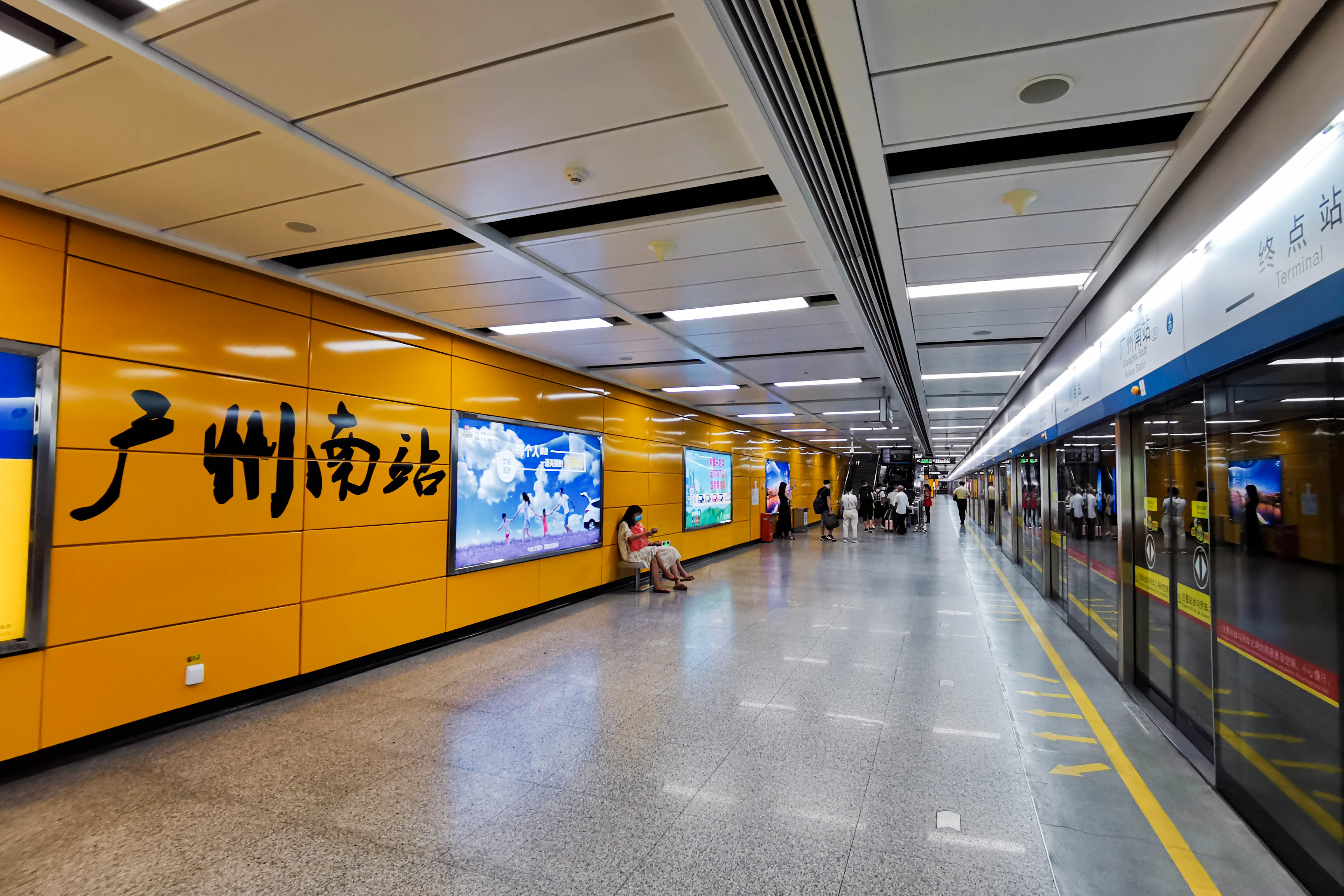 广州地铁广州南站